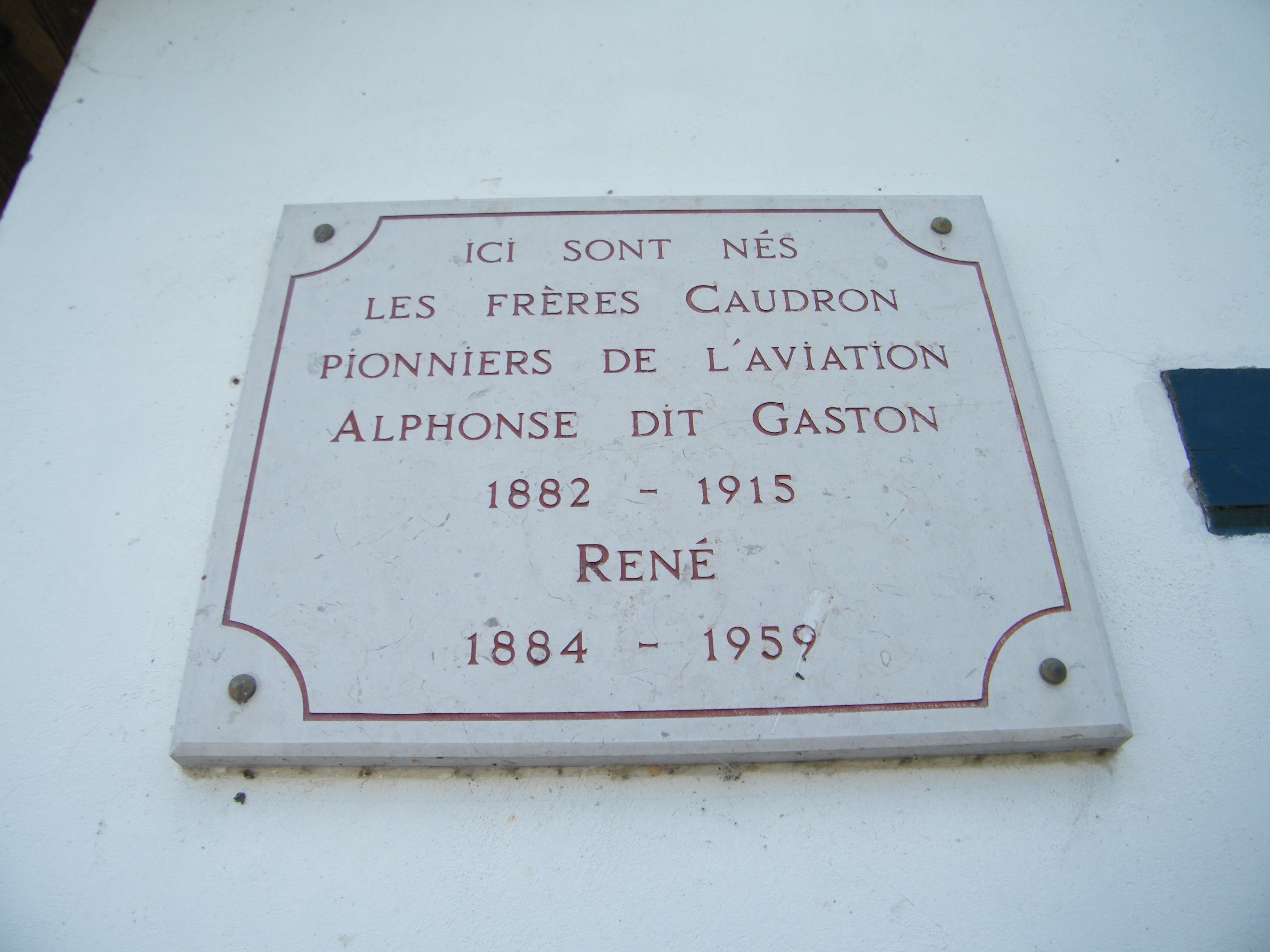 Favières, Somme, plaque rappelant la naissance des Frères Caudron.